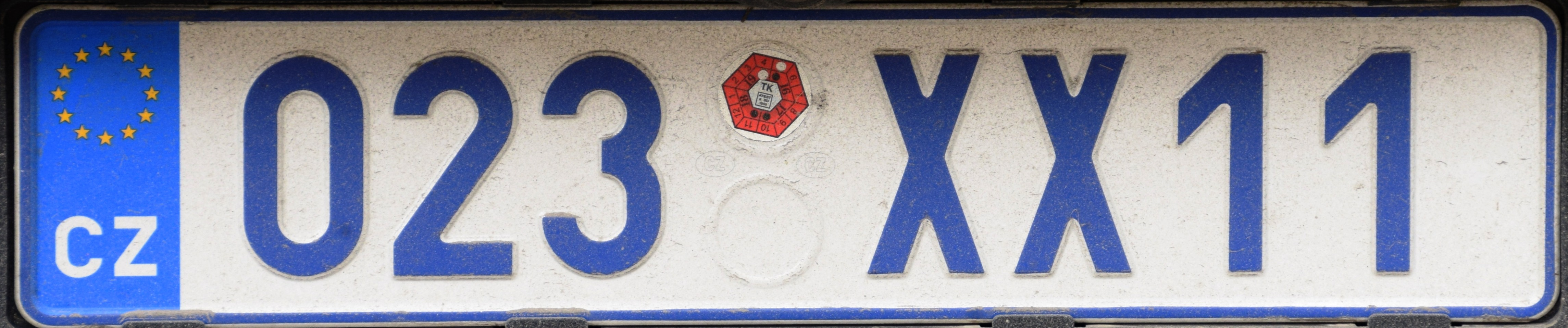 Tsjechische CD kentekenplaat